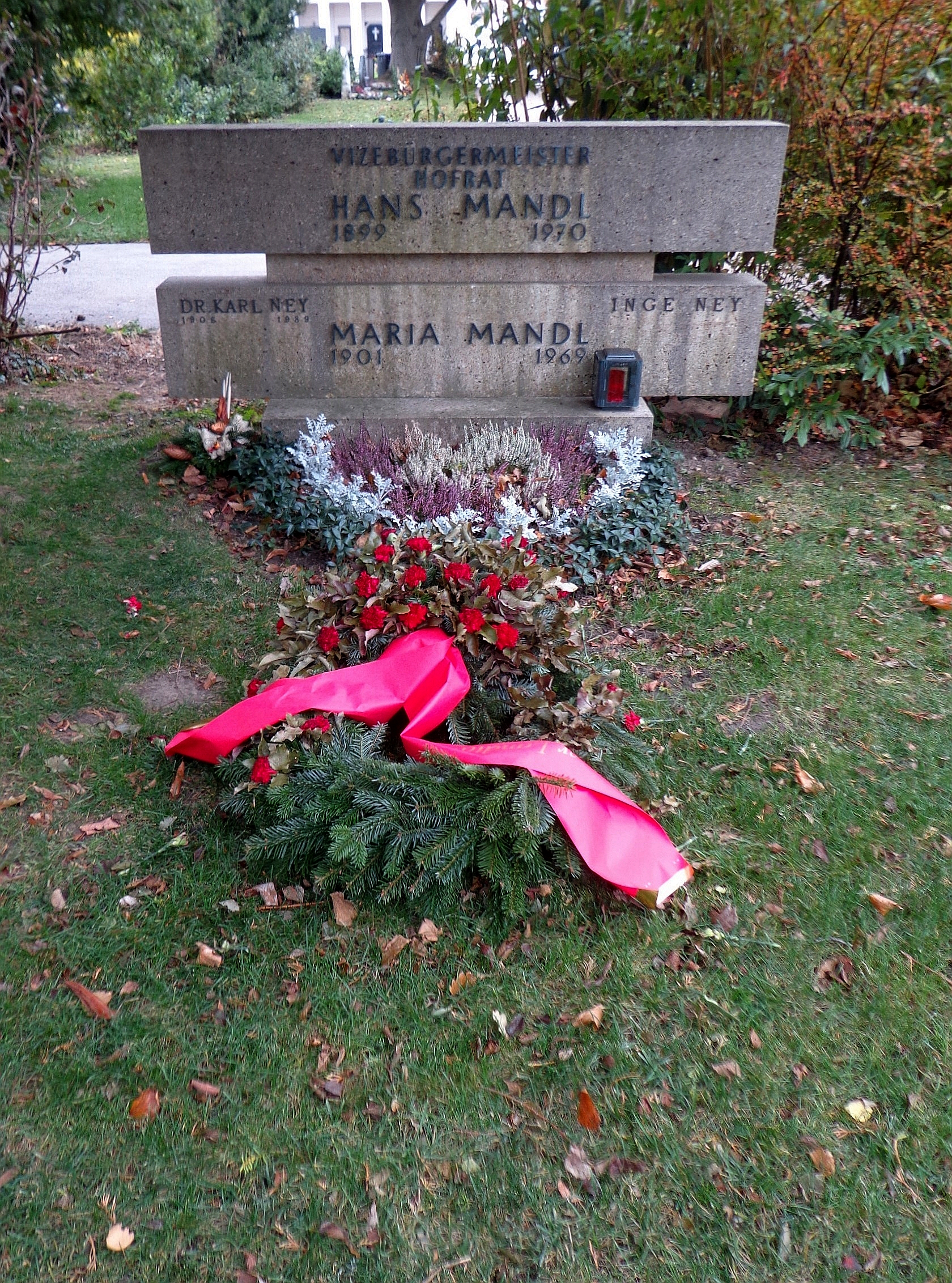 Wiener Zentralfriedhof - Gruppe 14 C, Ehrengrab von Hans Mandl